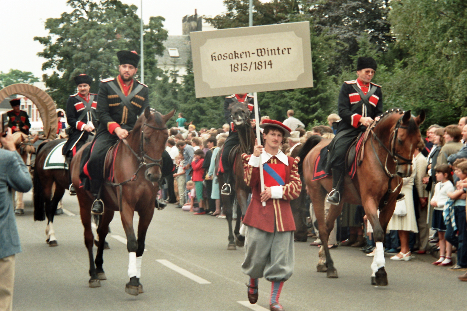 Immpressionen vom “Großen Jubiläums-Umzug” anläßlich der 750-Jahr-Feier der Stadt Uetersen mit 15 Musikzügen und über 60 Vereinen und Verbänden. Es war der größte Umzug in der Geschichte der Stadt Uetersen.